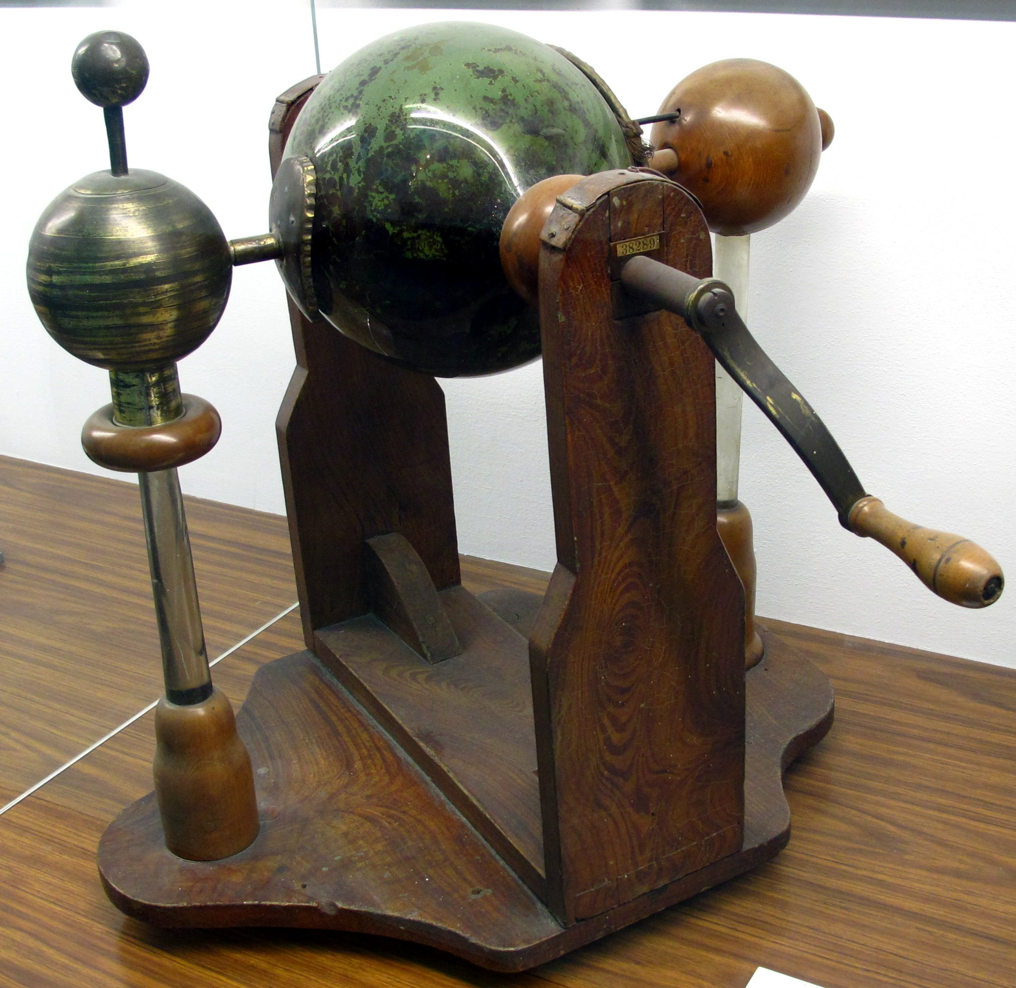 Reibungselektrisiermaschine mit Glaskugel